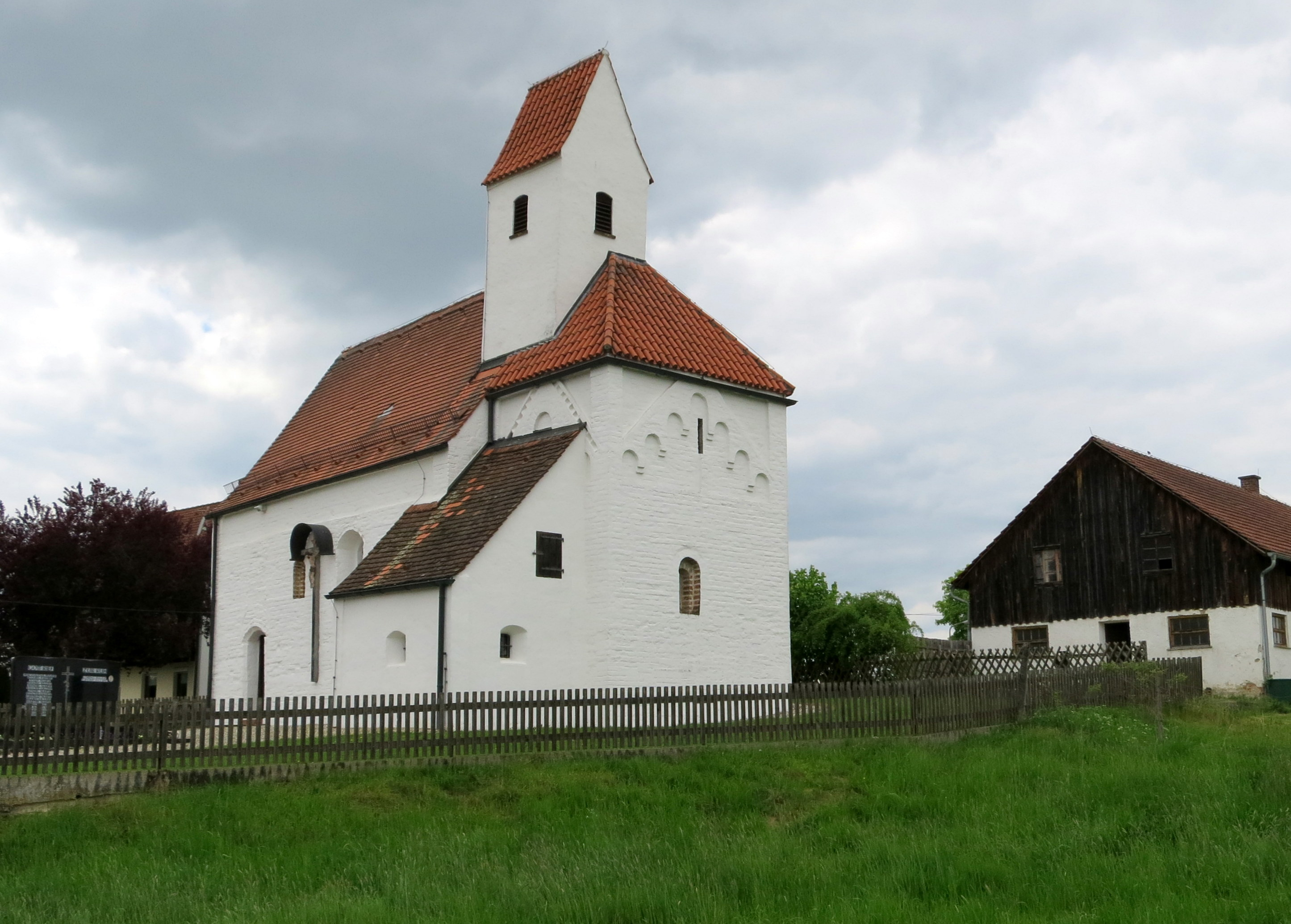 Eine alte kleine Kirche aus dem Mittelalter mit schöner Ausstattung aus dem Frühbarock